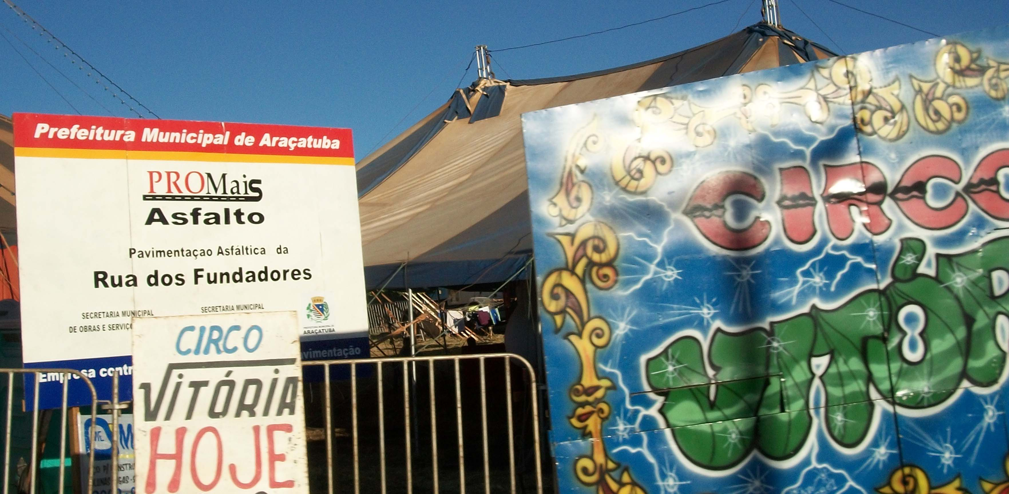 Programa ProMaisAsfalto Governo Cido Serio em Araçatuba.